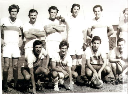 Raúl Othacehé, intendente de Merlo, con amigos en 1972, parado, segundo desde la izquierda.